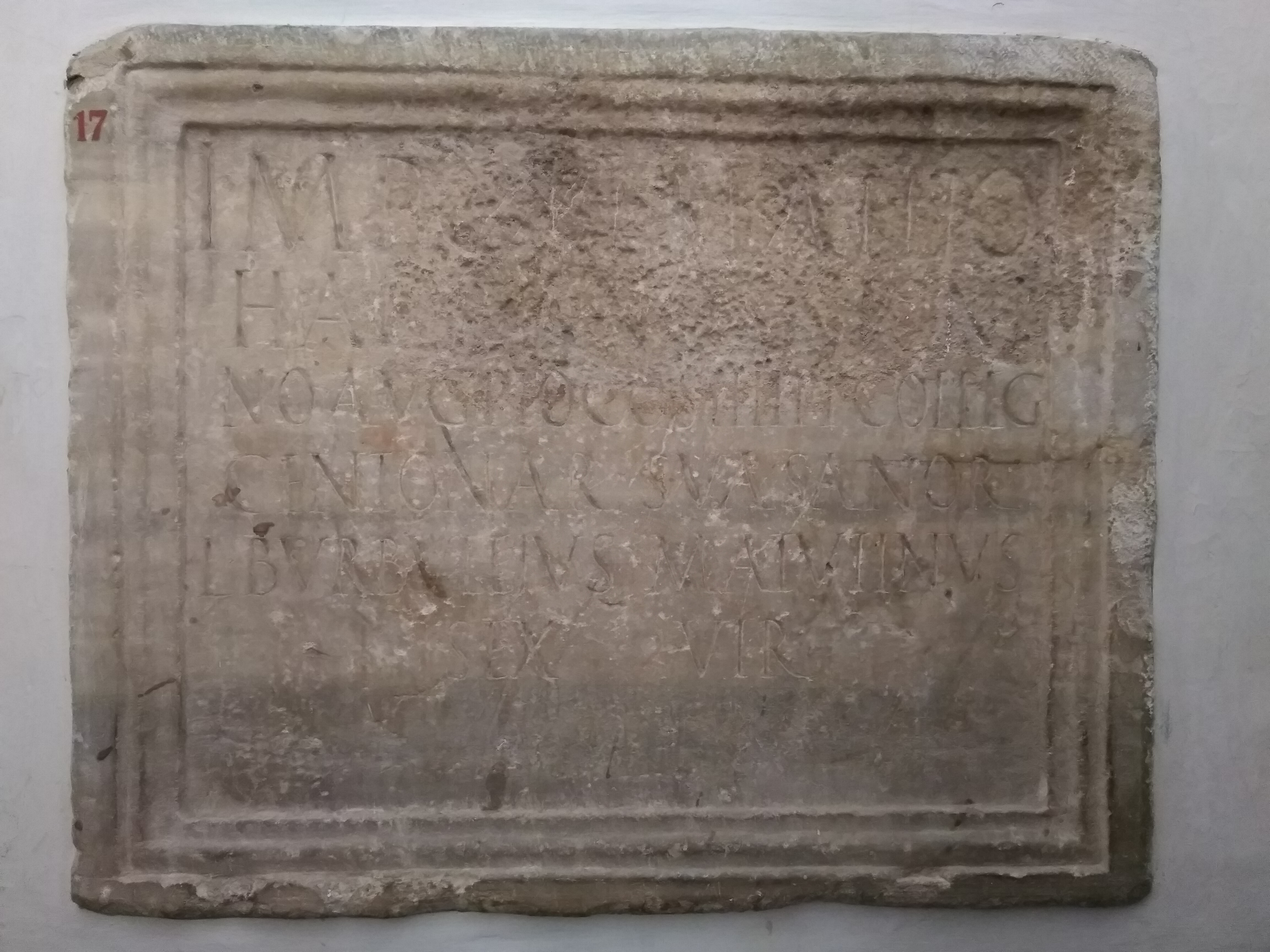 Iscrizione di Lucius Burbuleius Matutinus, da Suasa ("a lato di una strada che attraverso il colle Miralbellese scende al fiume Cesano"), Museo archeologico oliveriano di Pesaro (CIL XI, 6162 = SupIt-18-S, pp. 338-339 = EDR 016322)